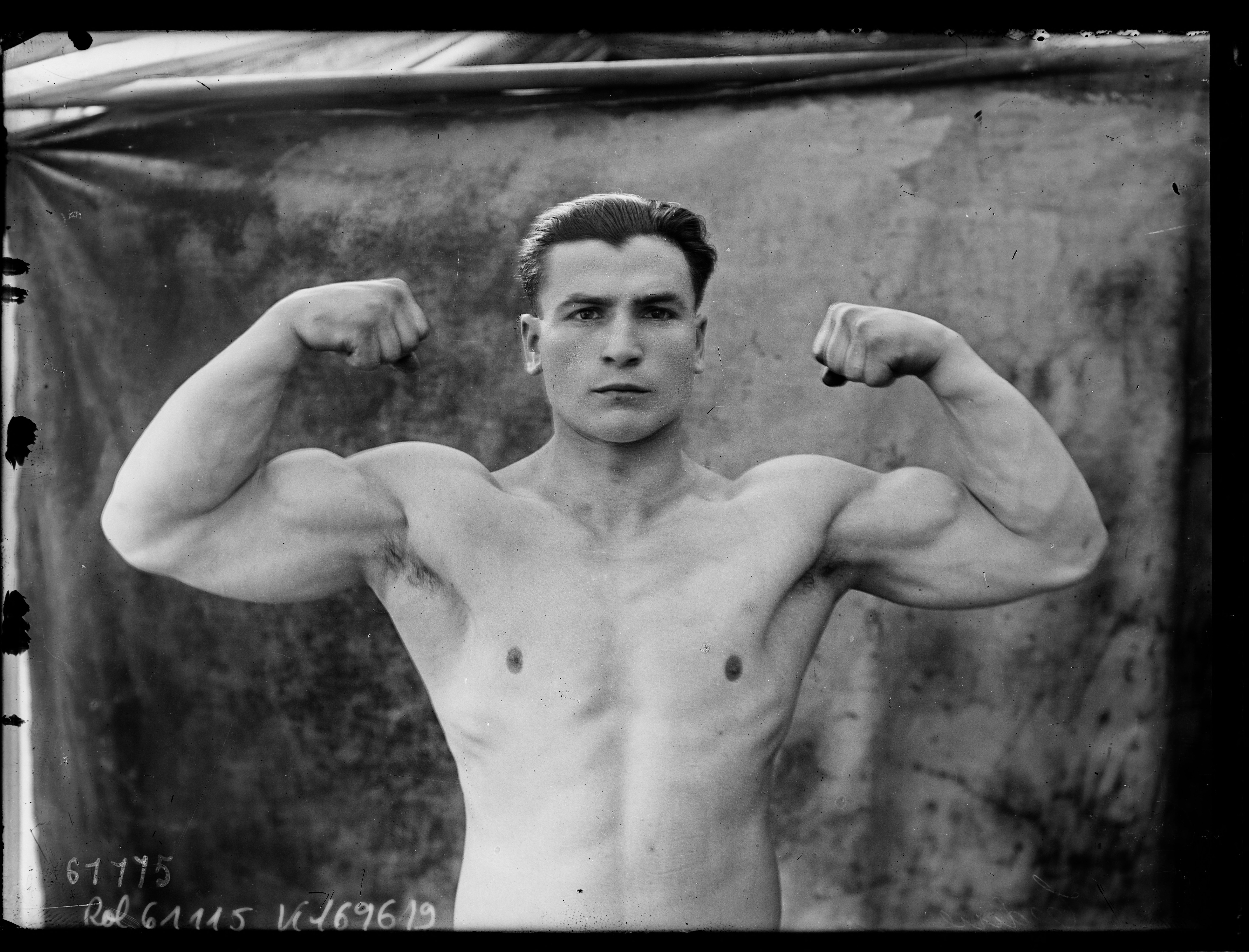 [Portrait de l'haltérophile Ernest] Cadine : [photographie de presse] / [Agence Rol]